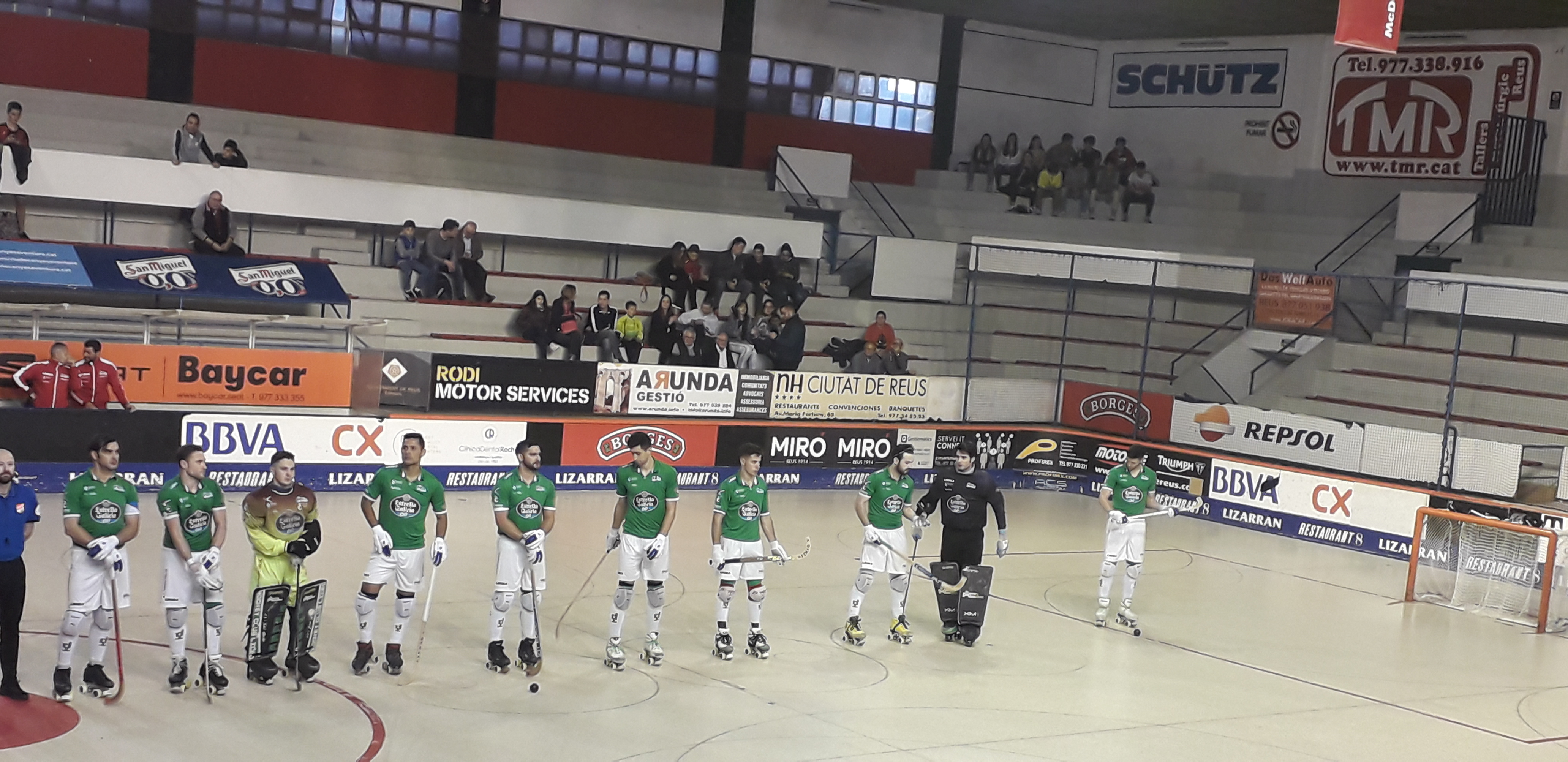 Plantilla Deportivo Liceo de la Coruña